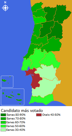 Eleições presidenciais de 1976 em Portugal